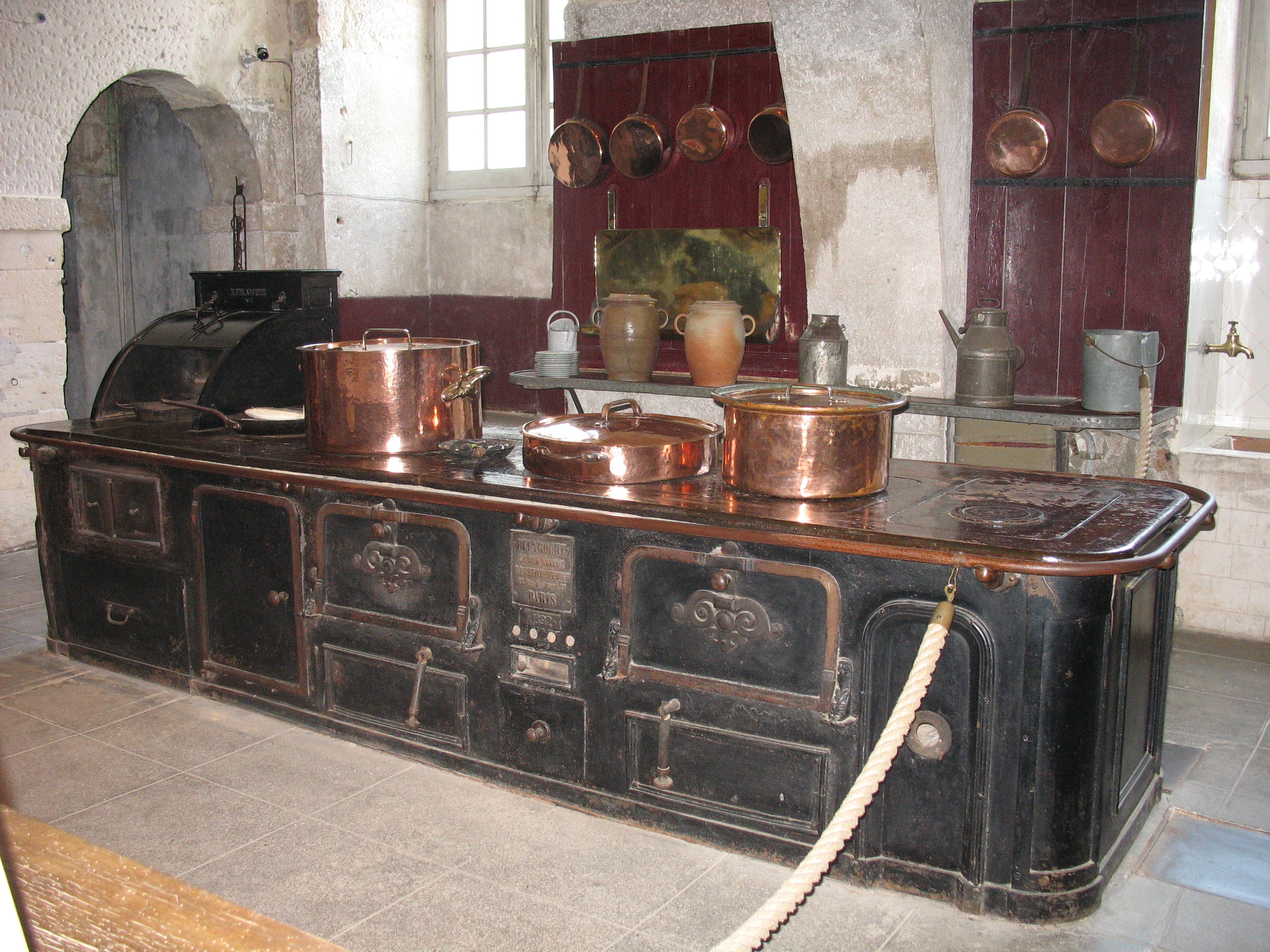 Le château de Valençay, cuisine